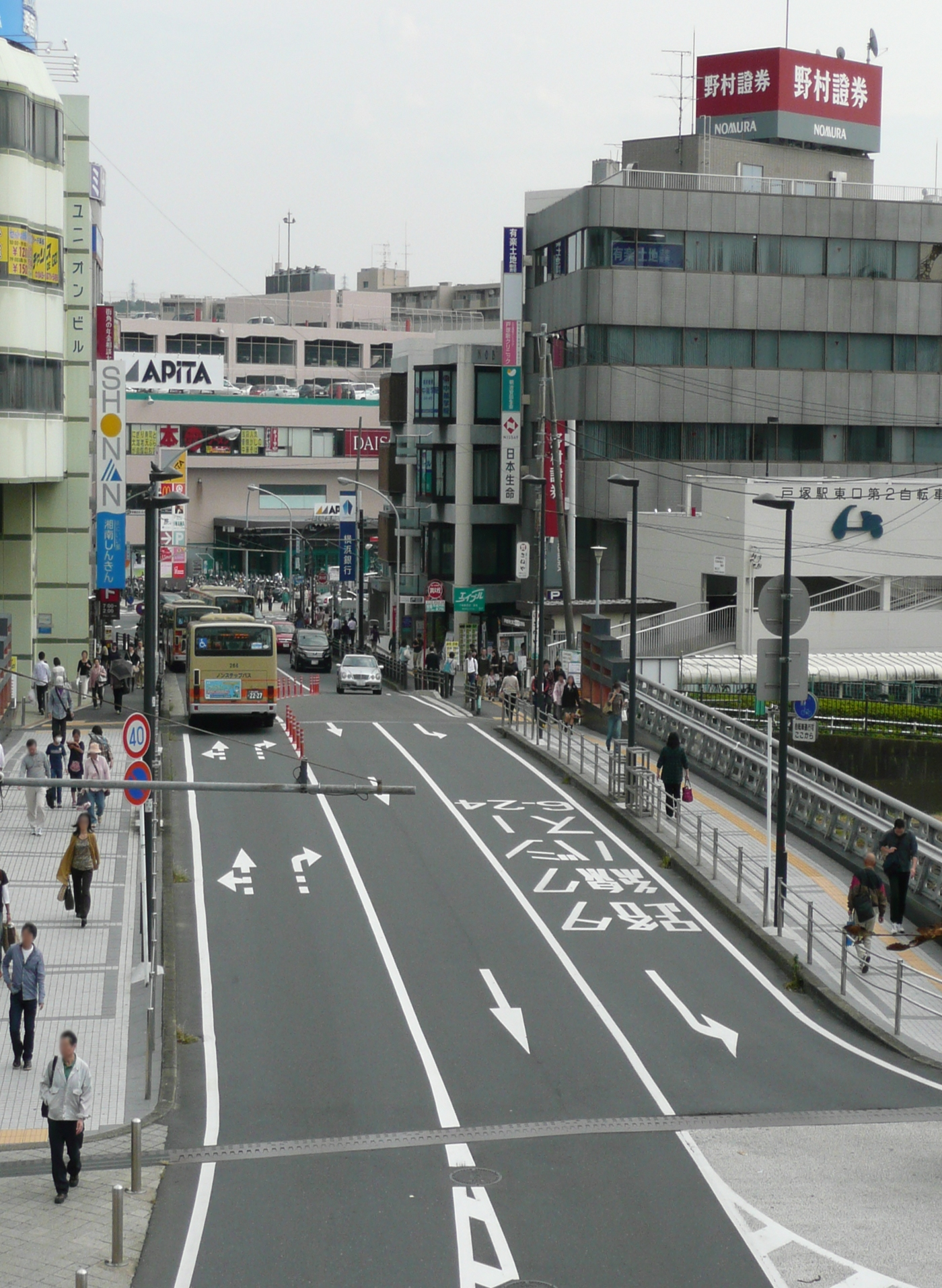 神奈川県道203号大船停車場矢部線（戸塚駅付近）